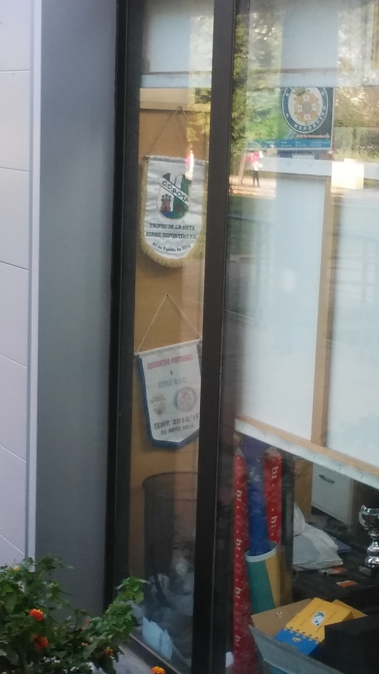 banderines del portuense y el rota en la sede del Xerez DFC